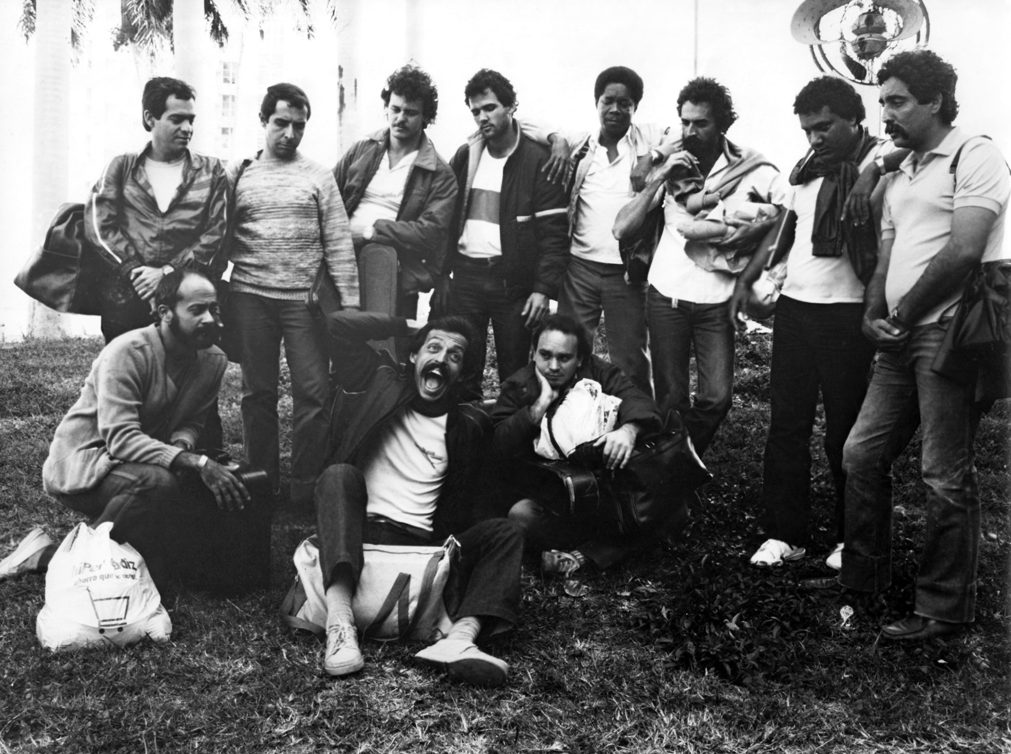 Foto del legendario grupo humorístico cubano "La Seña del humor"